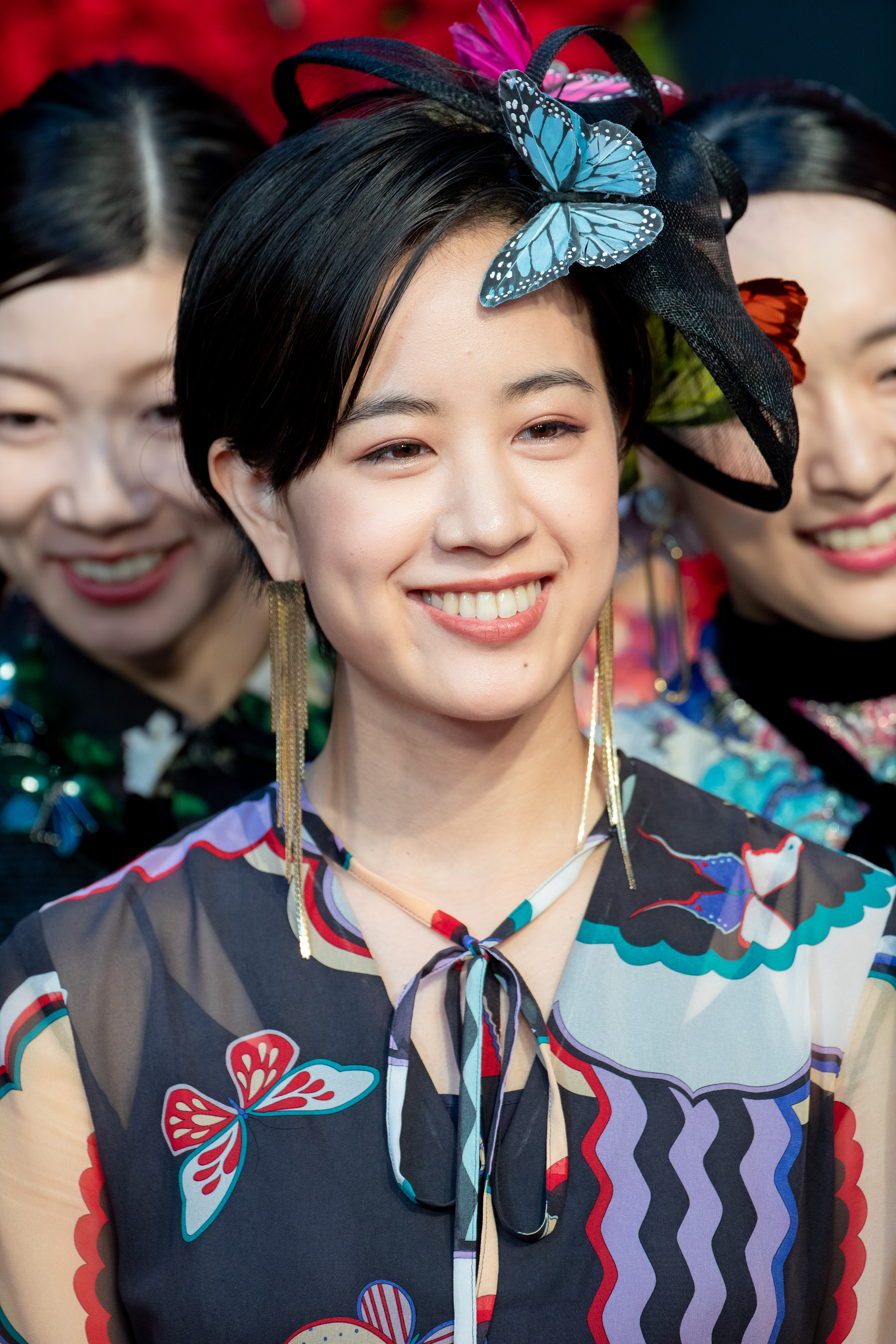 第30回 東京国際映画祭 オープニングセレモニー 石橋静河 (21世紀の女の子)